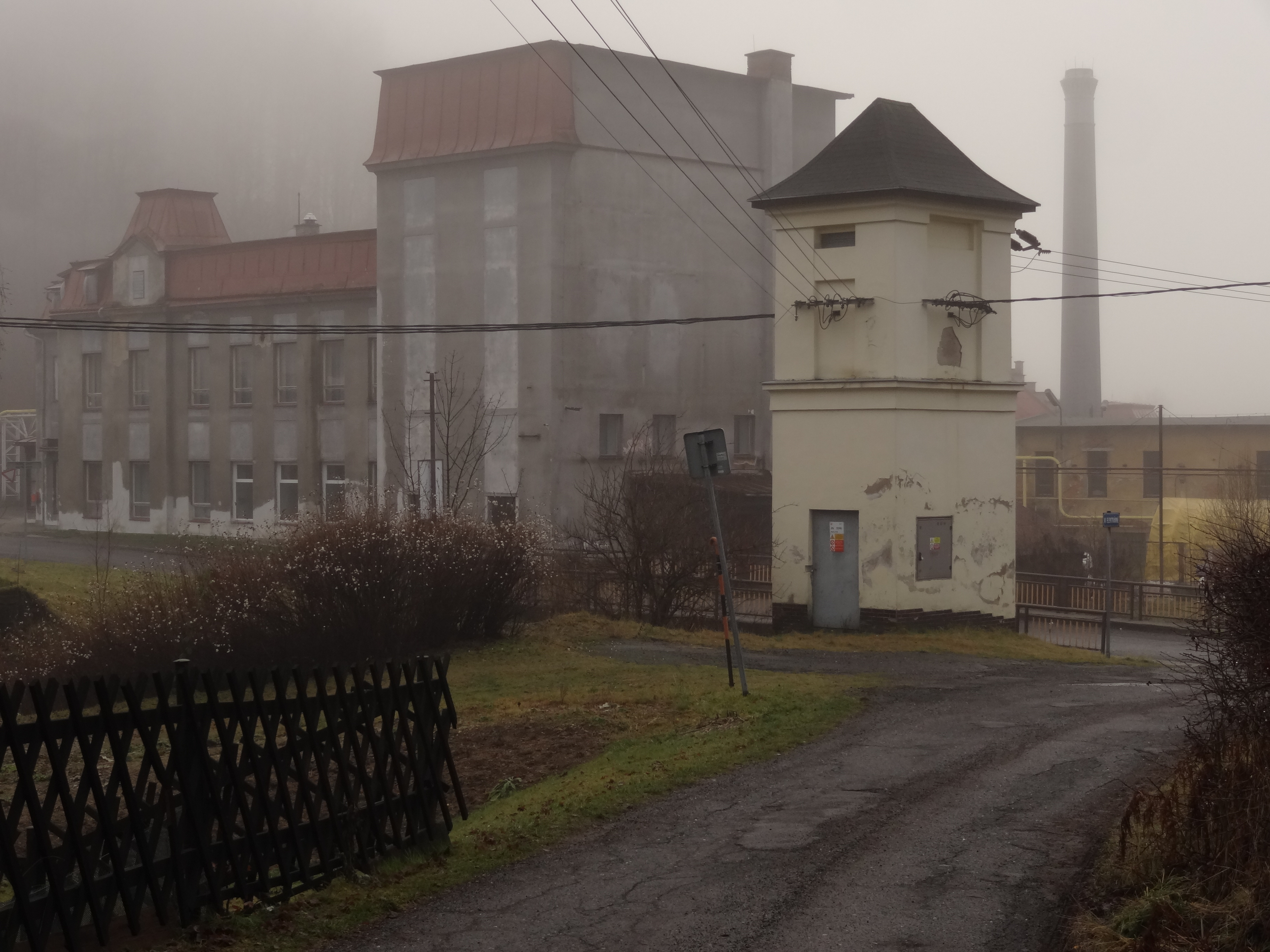 Desná III - kulturní dům Sklář (čp. 163)